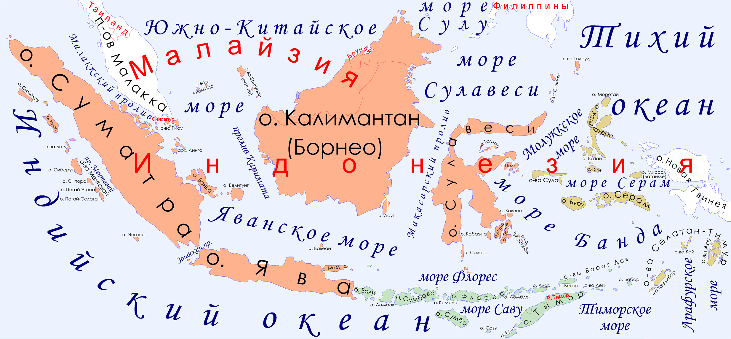 Arcipelago della Sonda